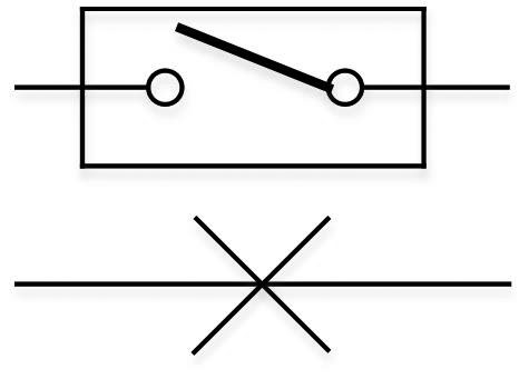 Sematska oznaka prekidaca snage